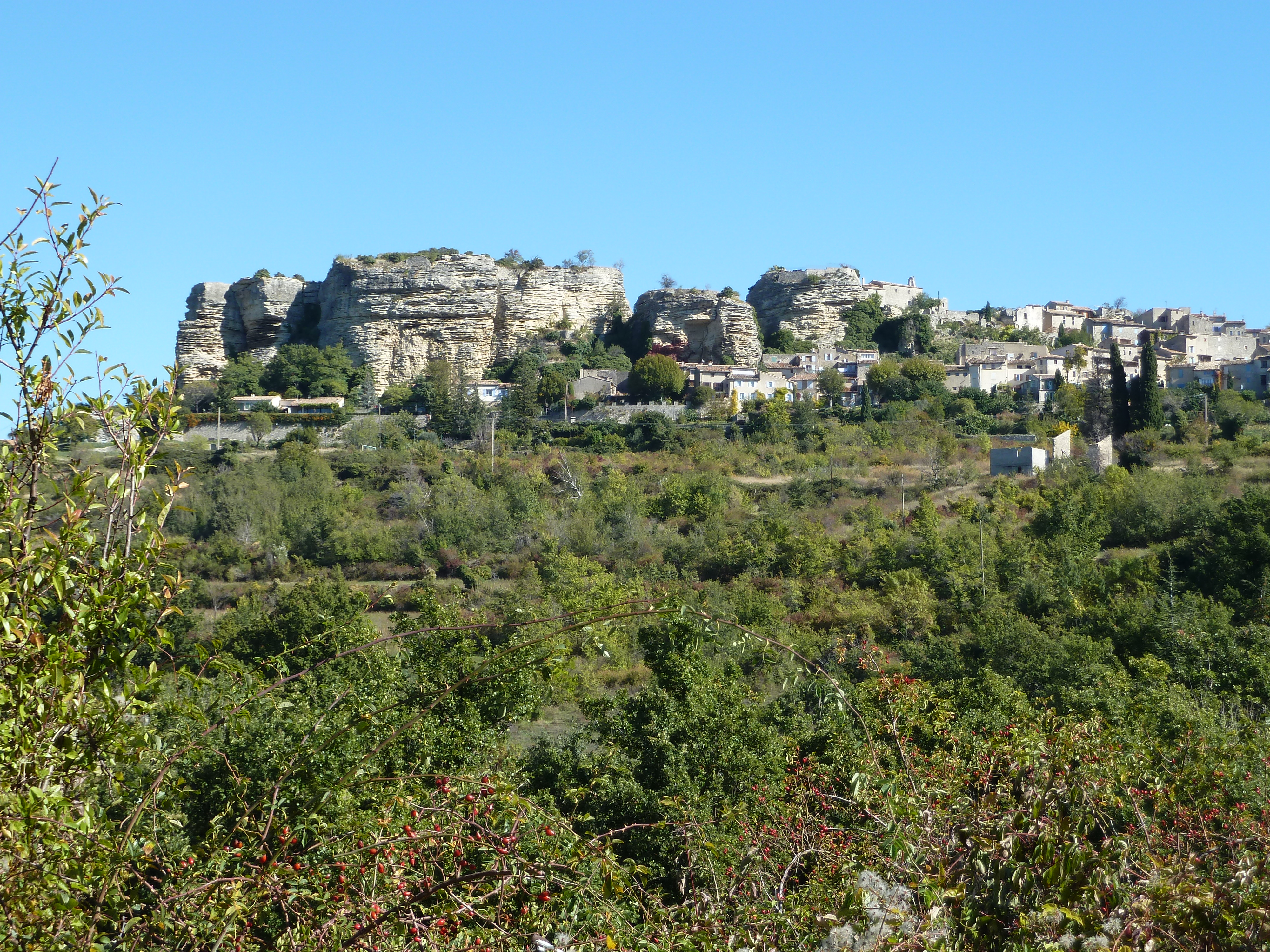 Les trois rochers de Saignon